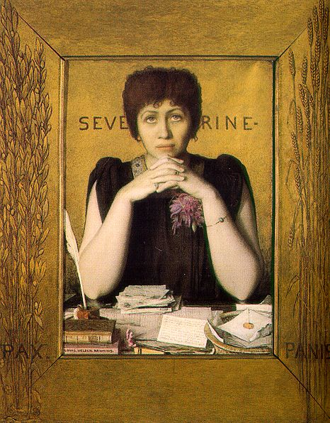 Mme Séverine